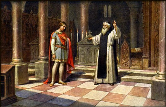 Josef Mathauser (1846-1917) - Václav III. u hrobu svého otce na Zbraslavi, napomínán opatem Konrádem, aby zanechal lehkomyslného života a věnoval se vládě